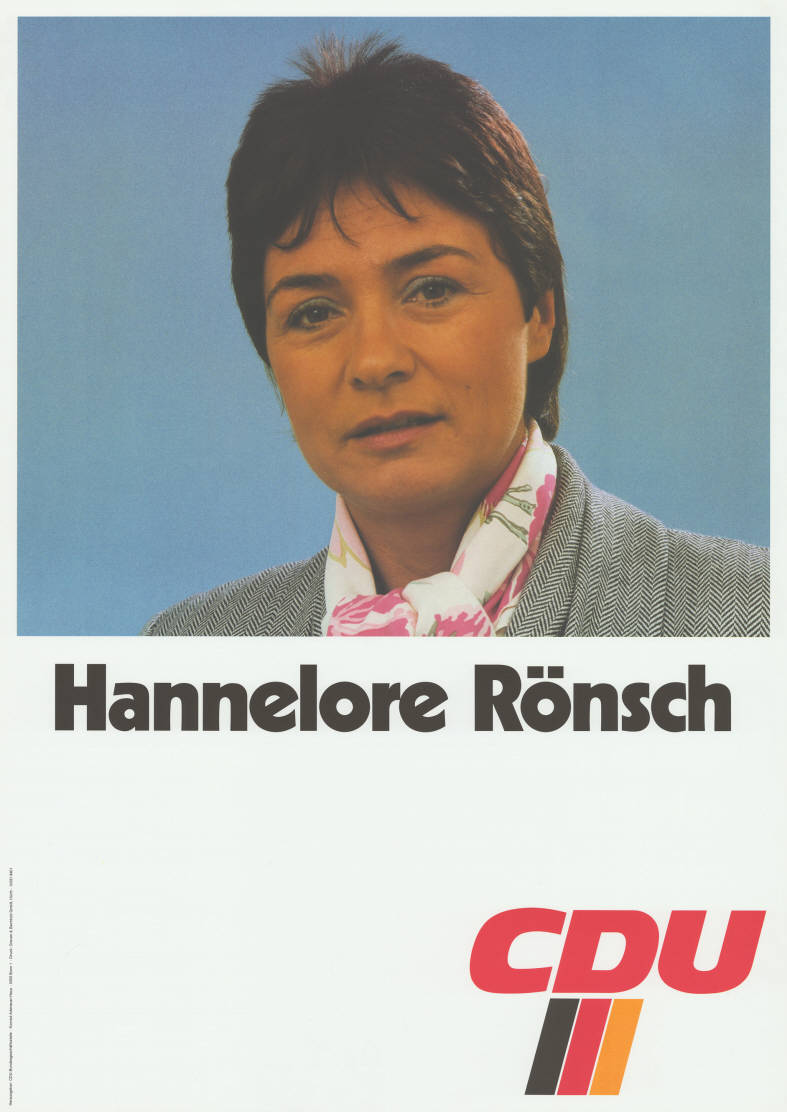 Hannelore Rönsch CDUAbbildung:PorträtfotoPlakatart:Kandidaten-/Personenplakat mit PorträtAuftraggeber:CDU-Bundesgeschäftsstelle, Konrad-Adenauer-Haus, BonnDrucker_Druckart_Druckort:Greven & Bechtold GmbH, HürthObjekt-Signatur:10-031 : 853Bestand:CDU-Plakate (10-031)GliederungBestand10-18:PersonenplakateLizenz:KAS/ACDP 10-031 : 853 CC-BY-SA 3.0 DE